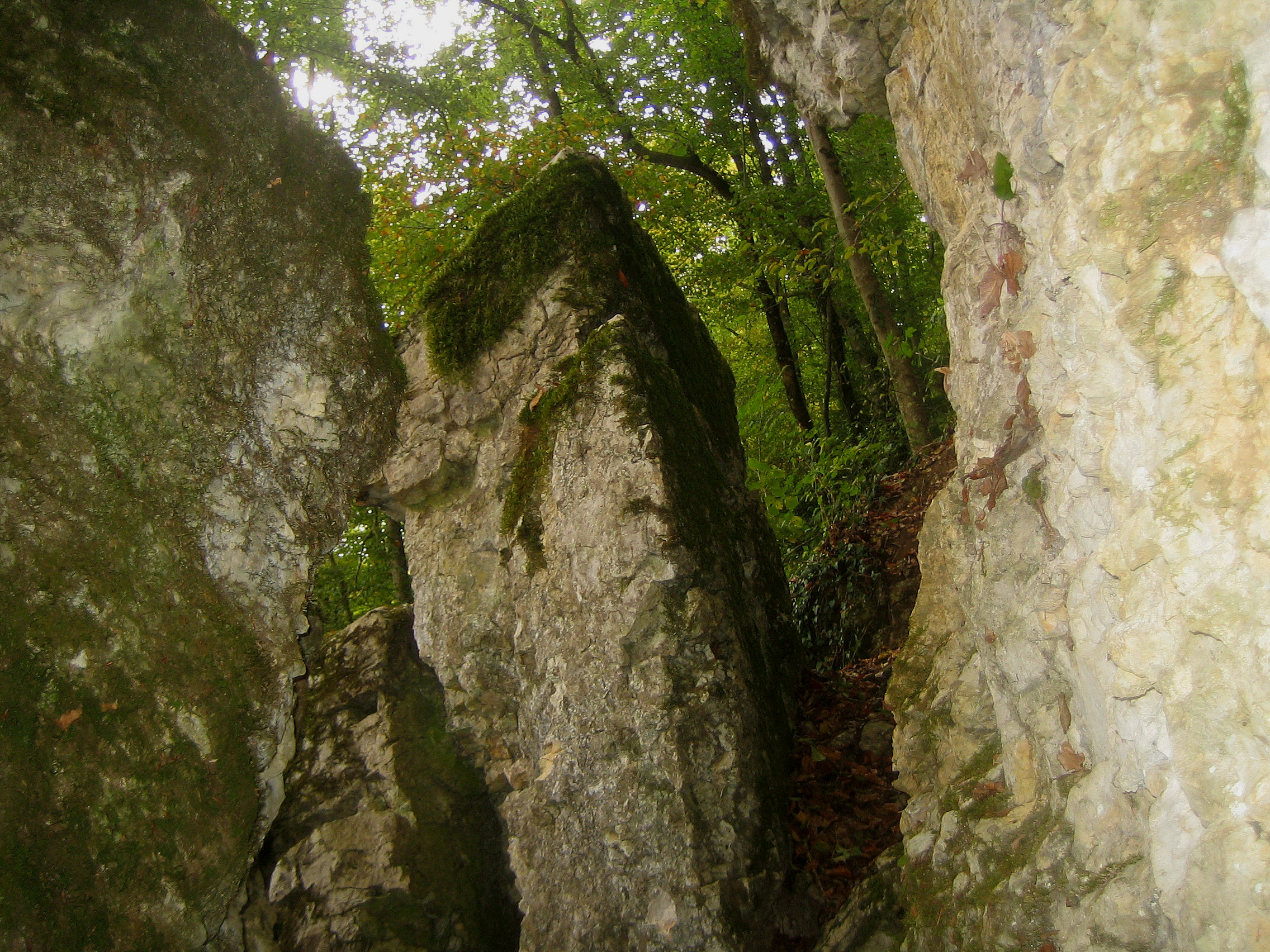 Wolfsschlucht bei Kandern